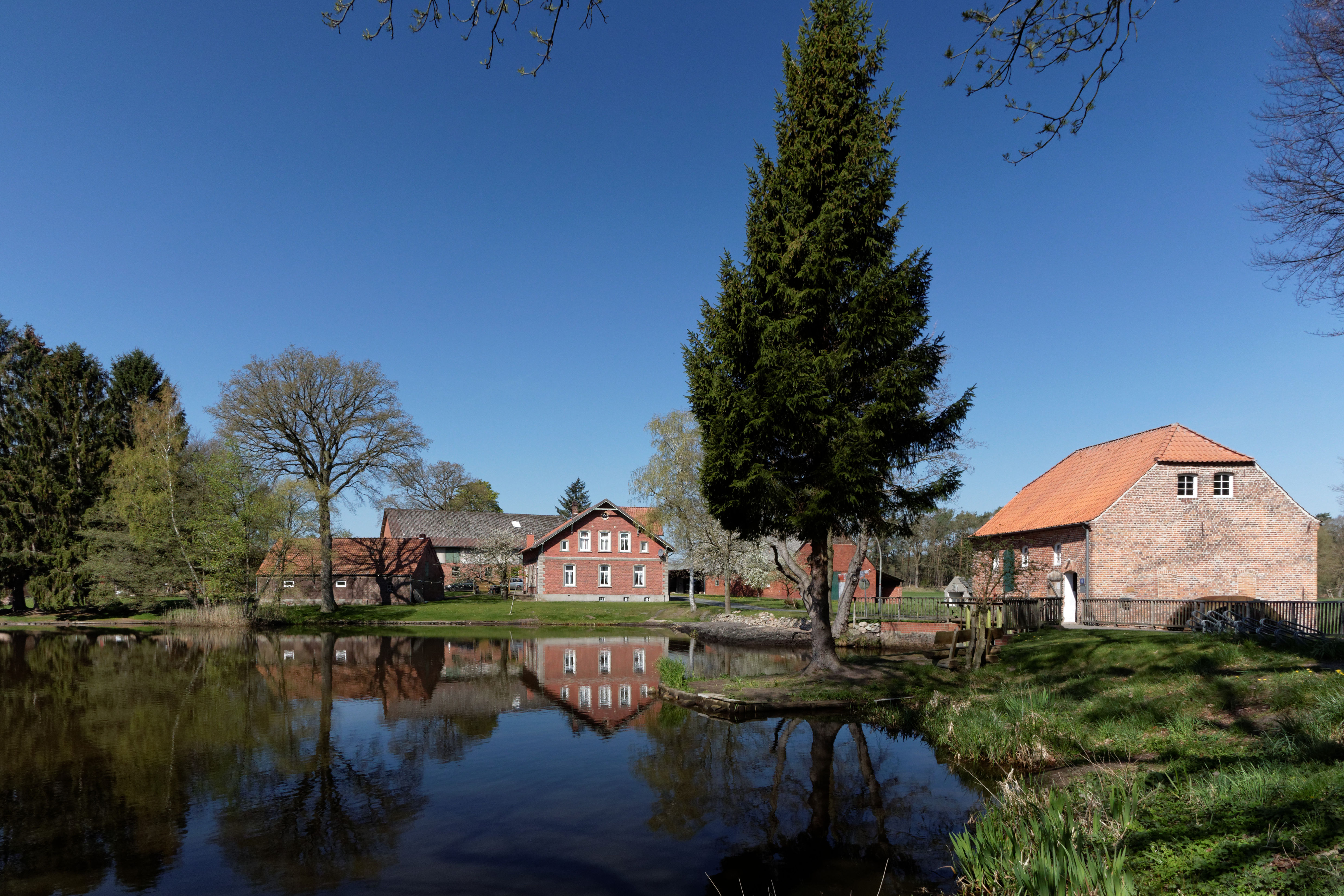 Bademühle - Wassermühle an der Bade in Bademühlen Bademühle - Wassermühle an der Bade in Bademühlen